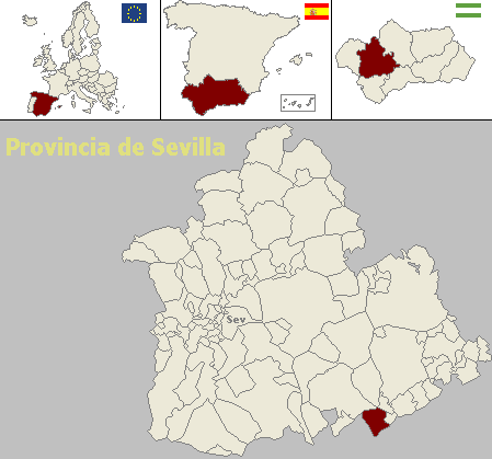 Mapa de localización del municipio sevillano de Pruna (Andalucía, España)